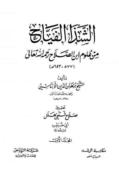 كتاب في علوم الحديث